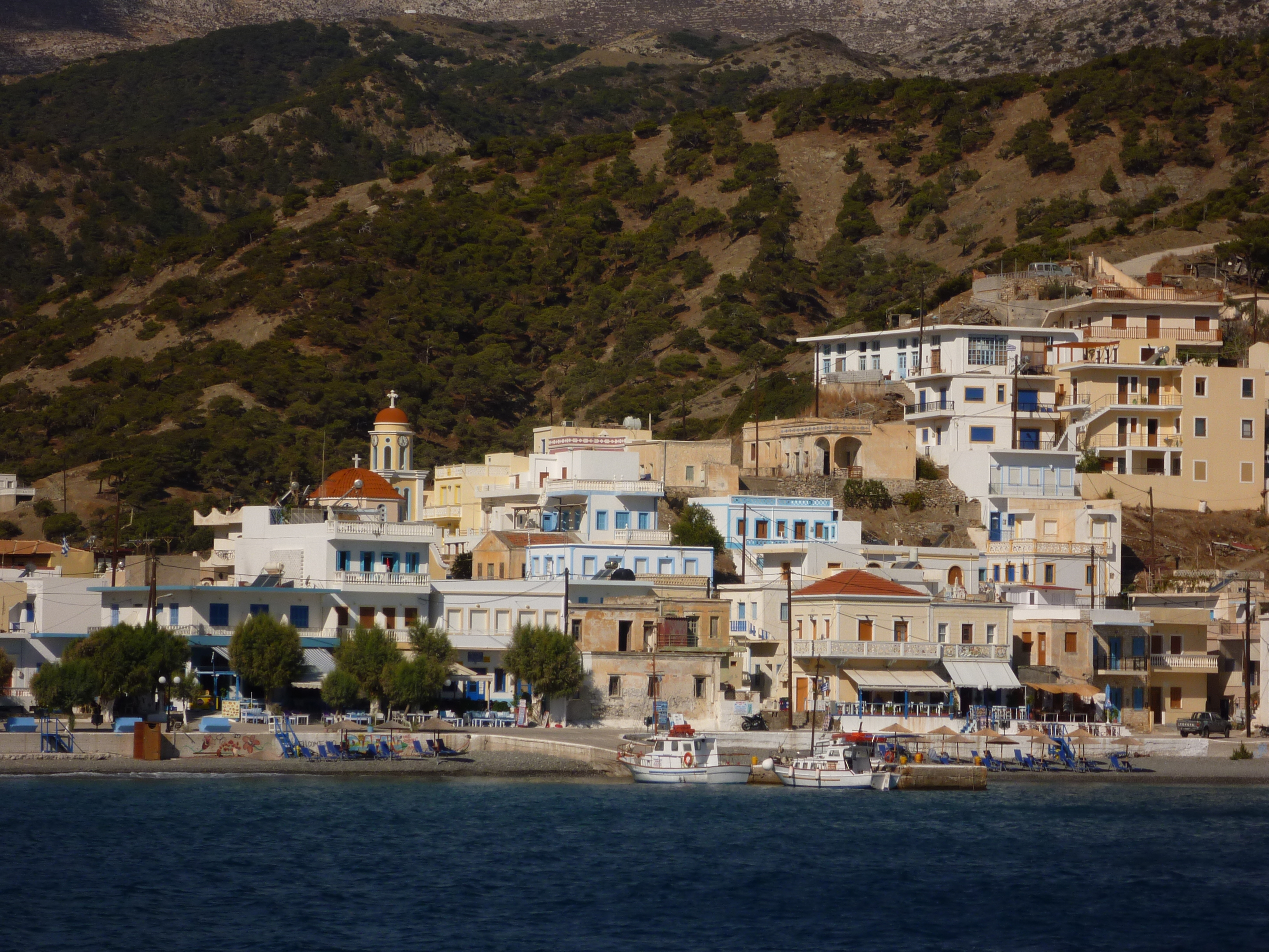 Blick auf den Ort Diafani an der Ostküste der griechischen Insel Karpathos.